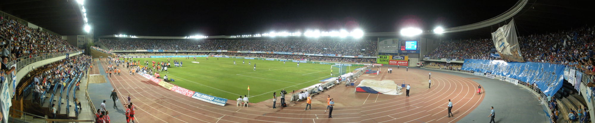 Panoramica del Estadio Municipal de Chapin